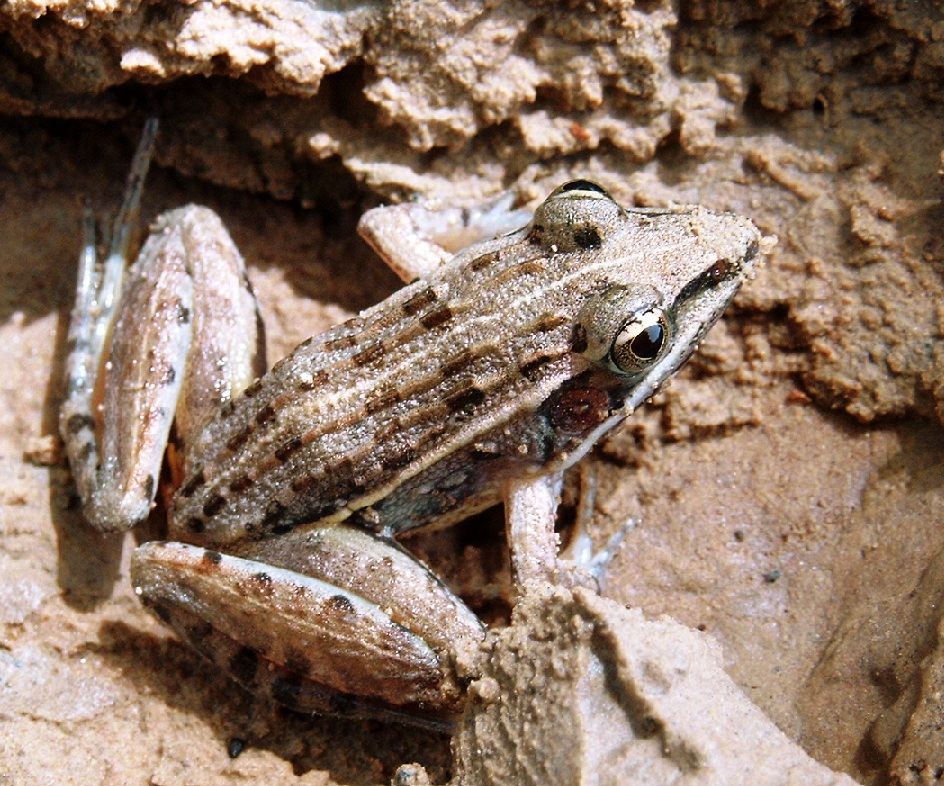 Nouvelle version de File:Ptychadena pumilio Bild1222.jpg (niveaux ; couleur ; retaillage - levels; colors; resize)